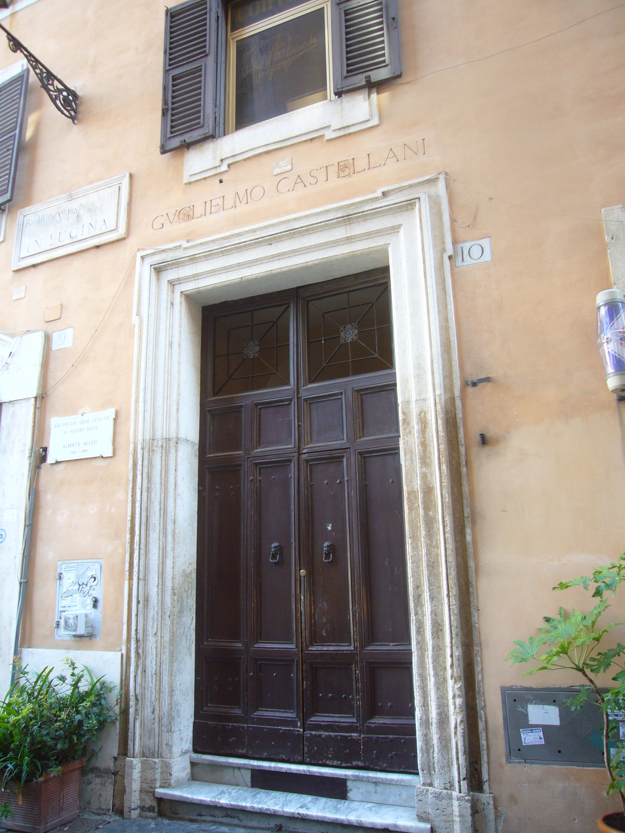 Roma, via in Lucina. Casa già di Guglielmo Castellani. Il palazzo fu poi acquistato da Alberto Alessi, detto "l'Artenese", figlio di N.N., cresciuto in orfanotrofio, poi arricchitosi con le fornitura militari, che alla morte (1990) lasciò i propri beni ai poveri, come ricorda la piccola lapide affissa a sinistra del portone.